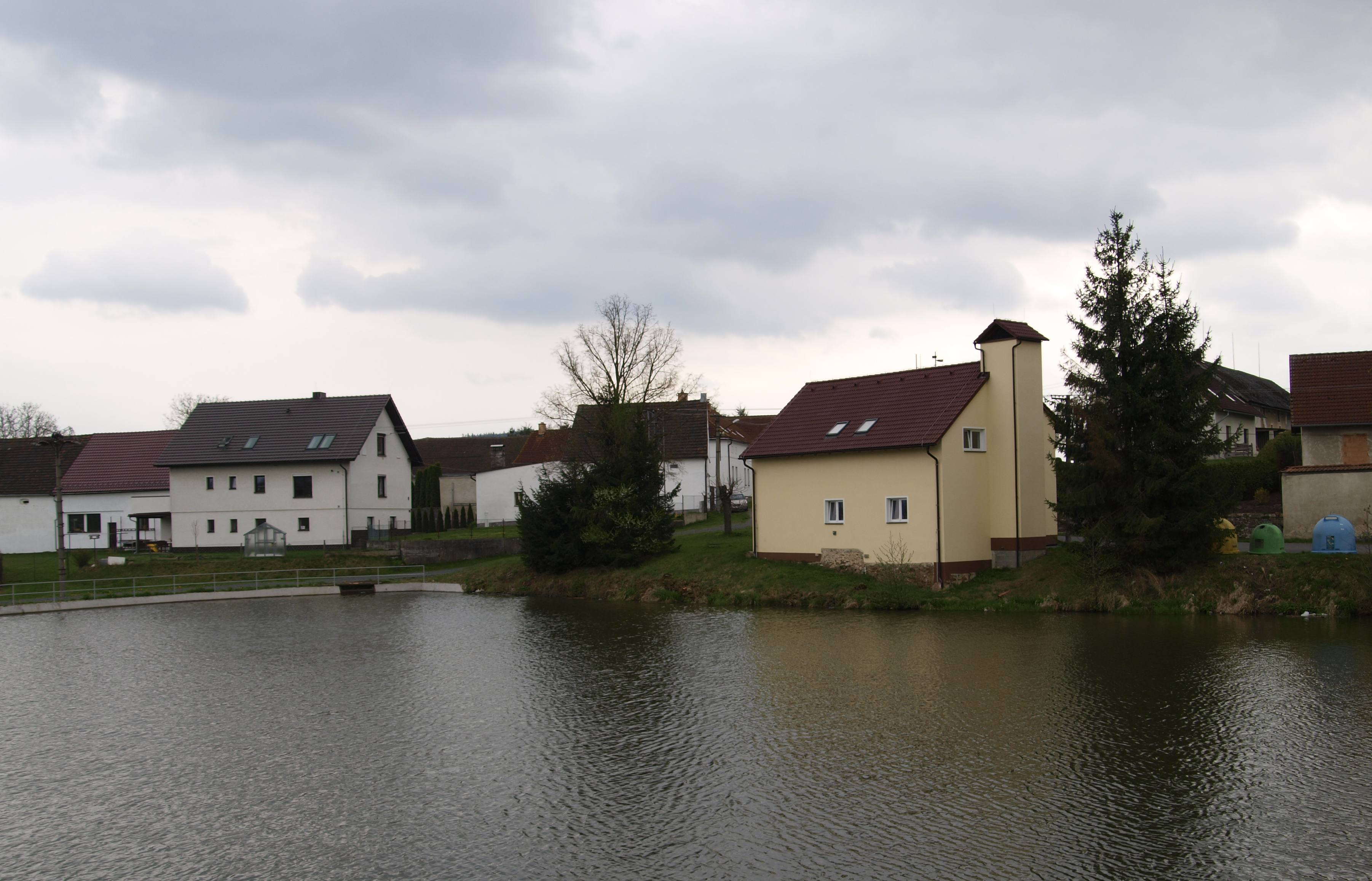 Petrovice (Újezd), okres Domažlice, rybník s hasičskou zbrojnicí Project: Fotíme Česko.